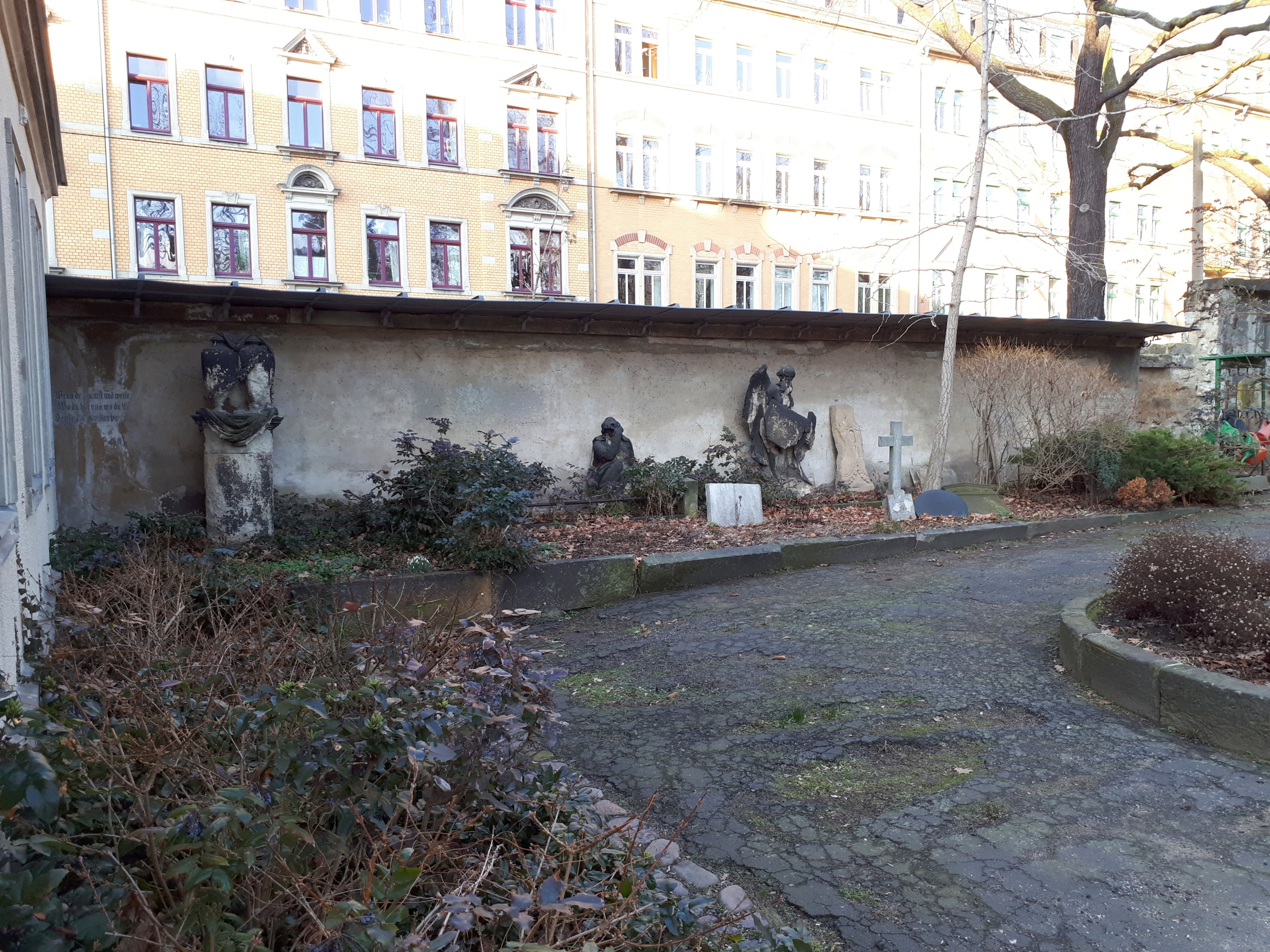 Ehemaliger Standort des Dresdner Totentanzes auf dem Innerer Neustädter Friedhof